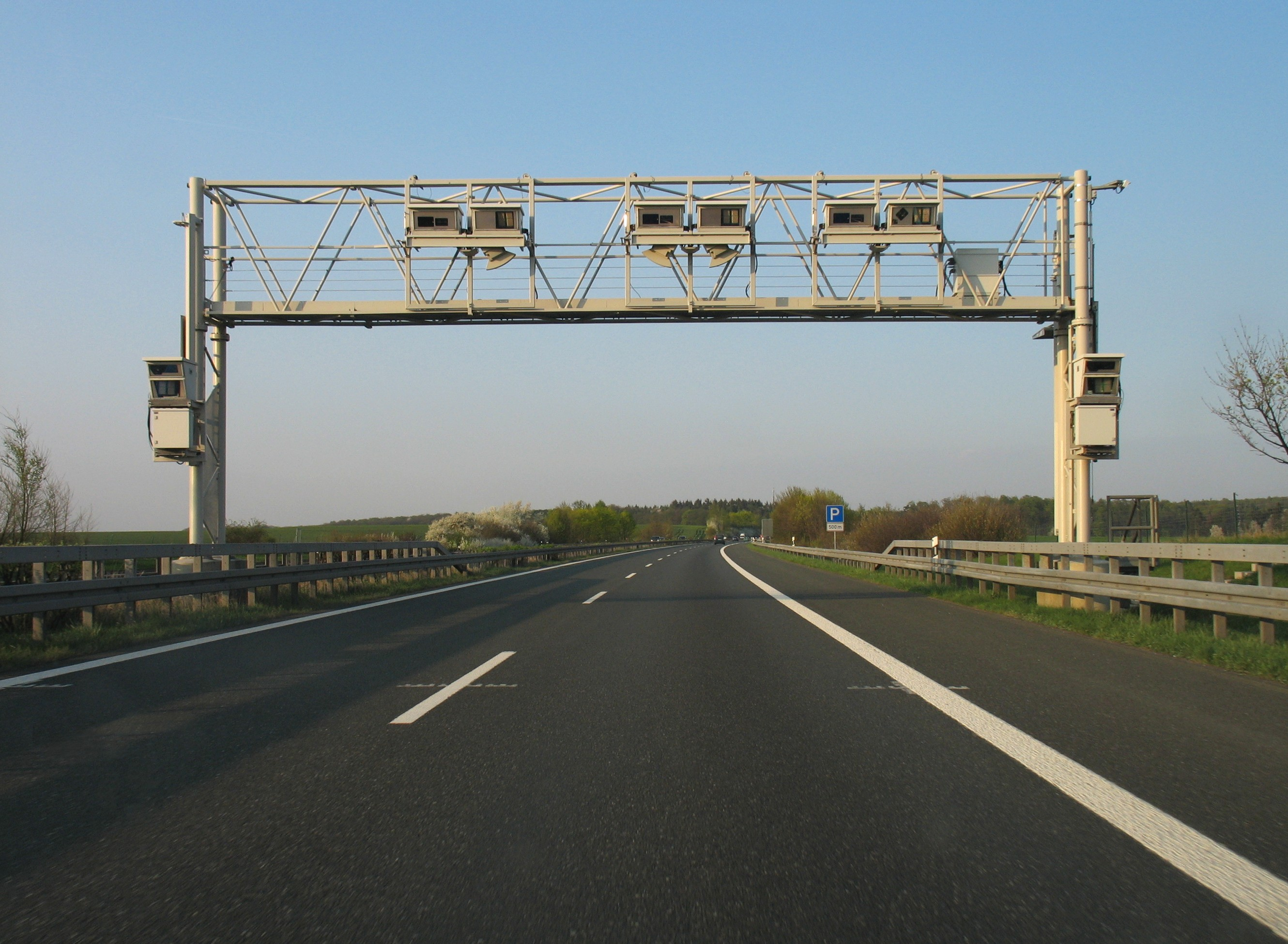 Mautbrücke auf der A81 nördlich von Tauberbischofsheim. Bild entzerrt mit hugin und bearbeitet mit gimp.